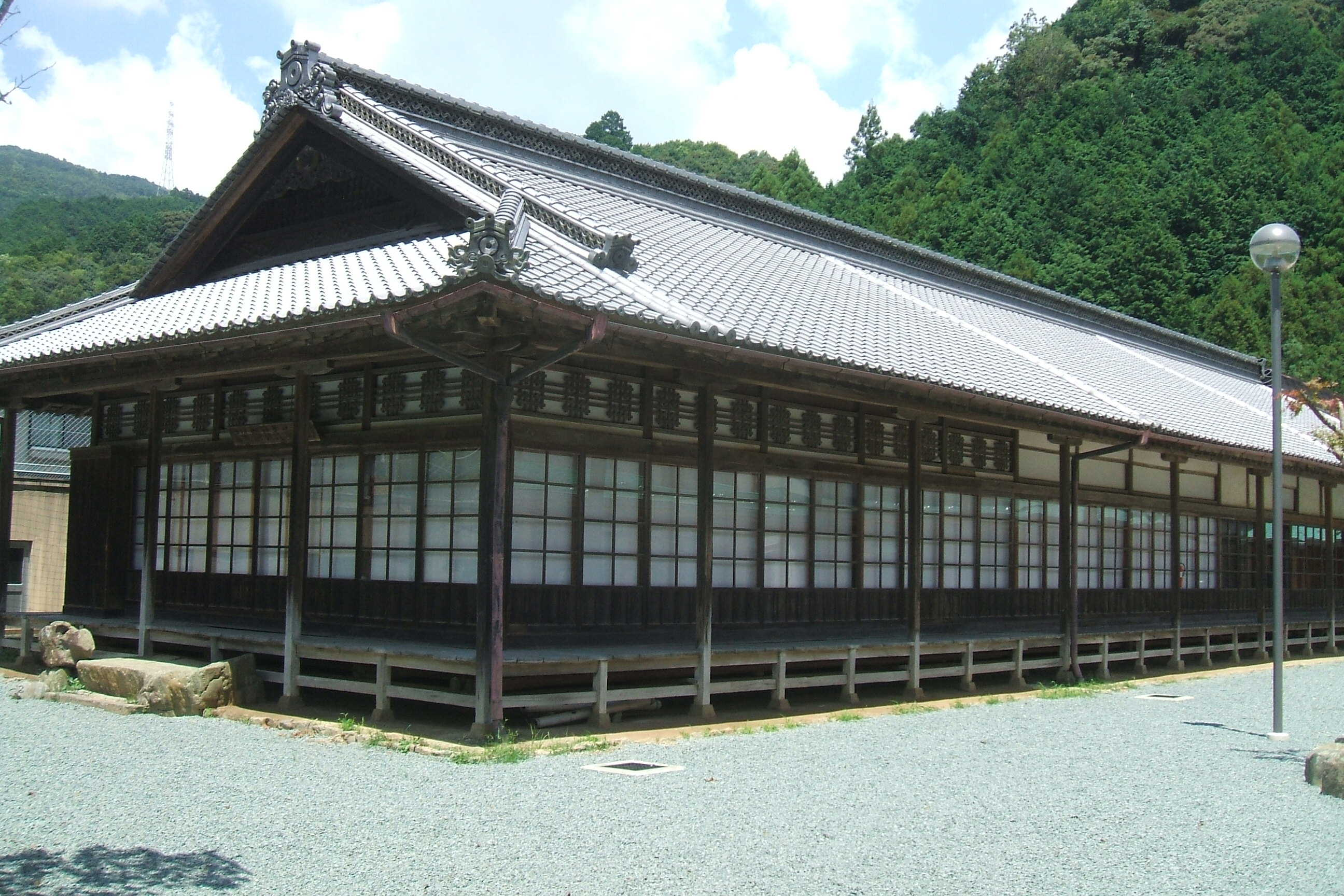 愛媛県大洲市新谷町にある旧新谷藩藩庁であった新谷陣屋の麟風閣を西側より撮影